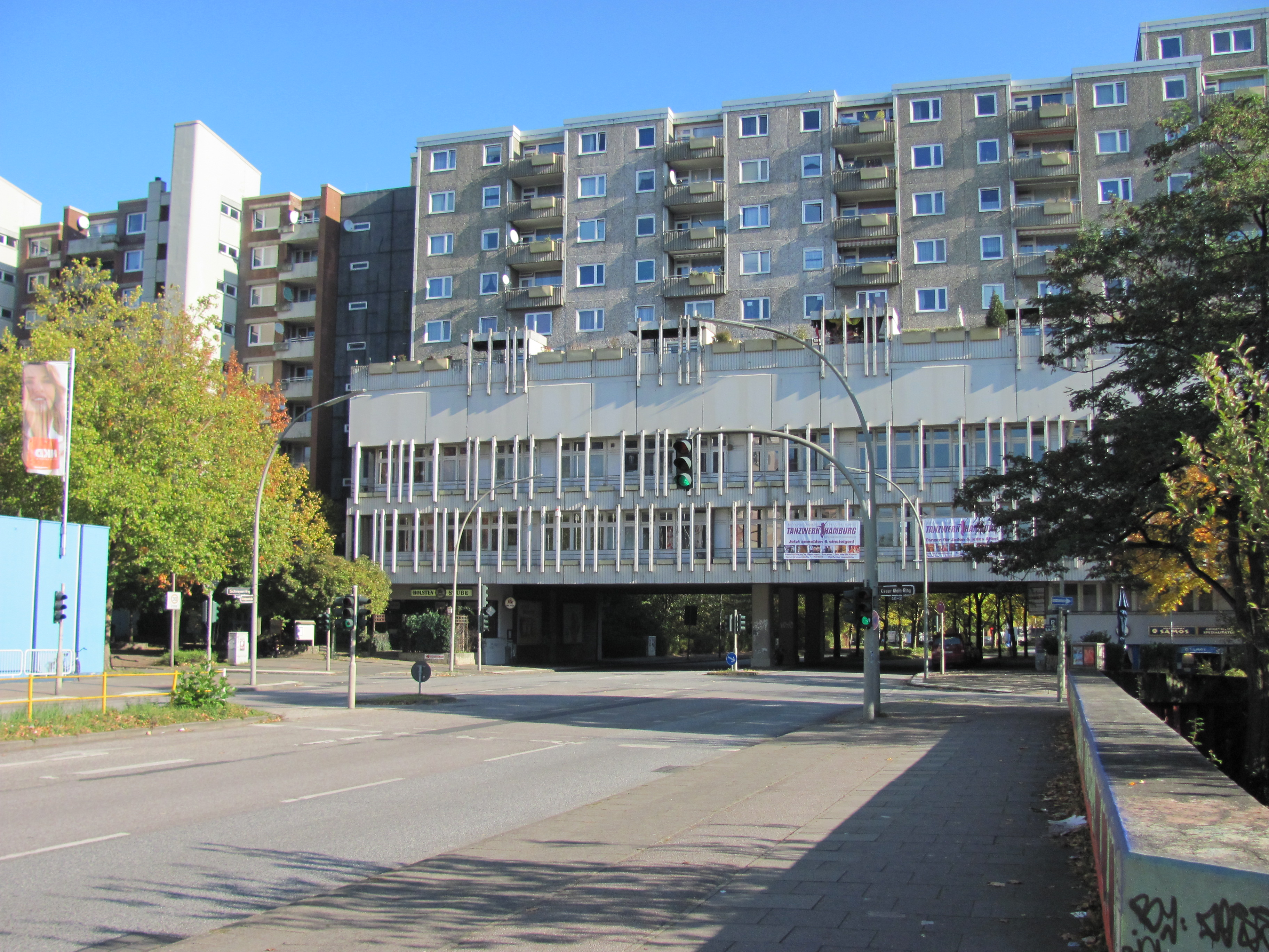 Haus über der Gründgensstraße, Hamburg-Steilshoop